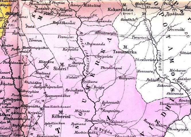 Χάρτης τμήματος των Τζουμέρκων, 1878